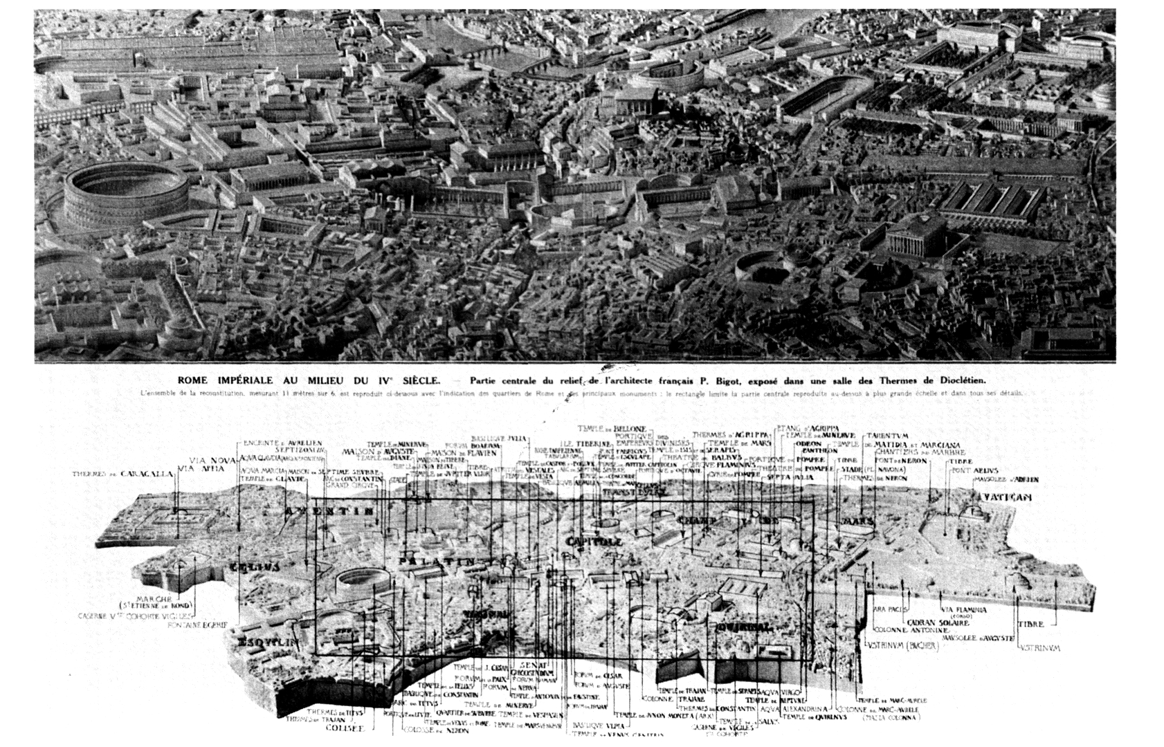 Plan de Rome de Paul Bigot, journal l'illustration du 12 août 1911